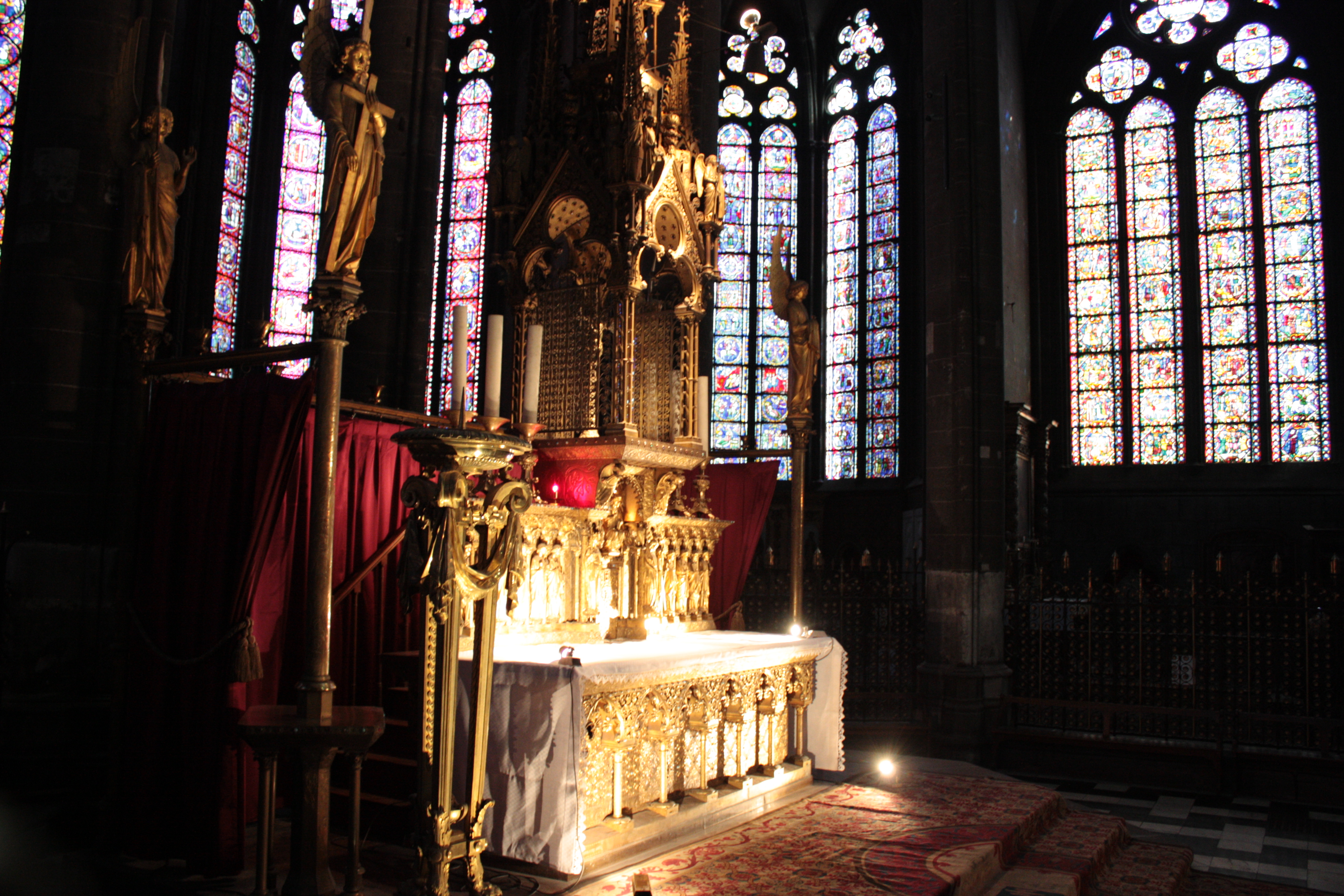 L'autel tridentin de Clermont